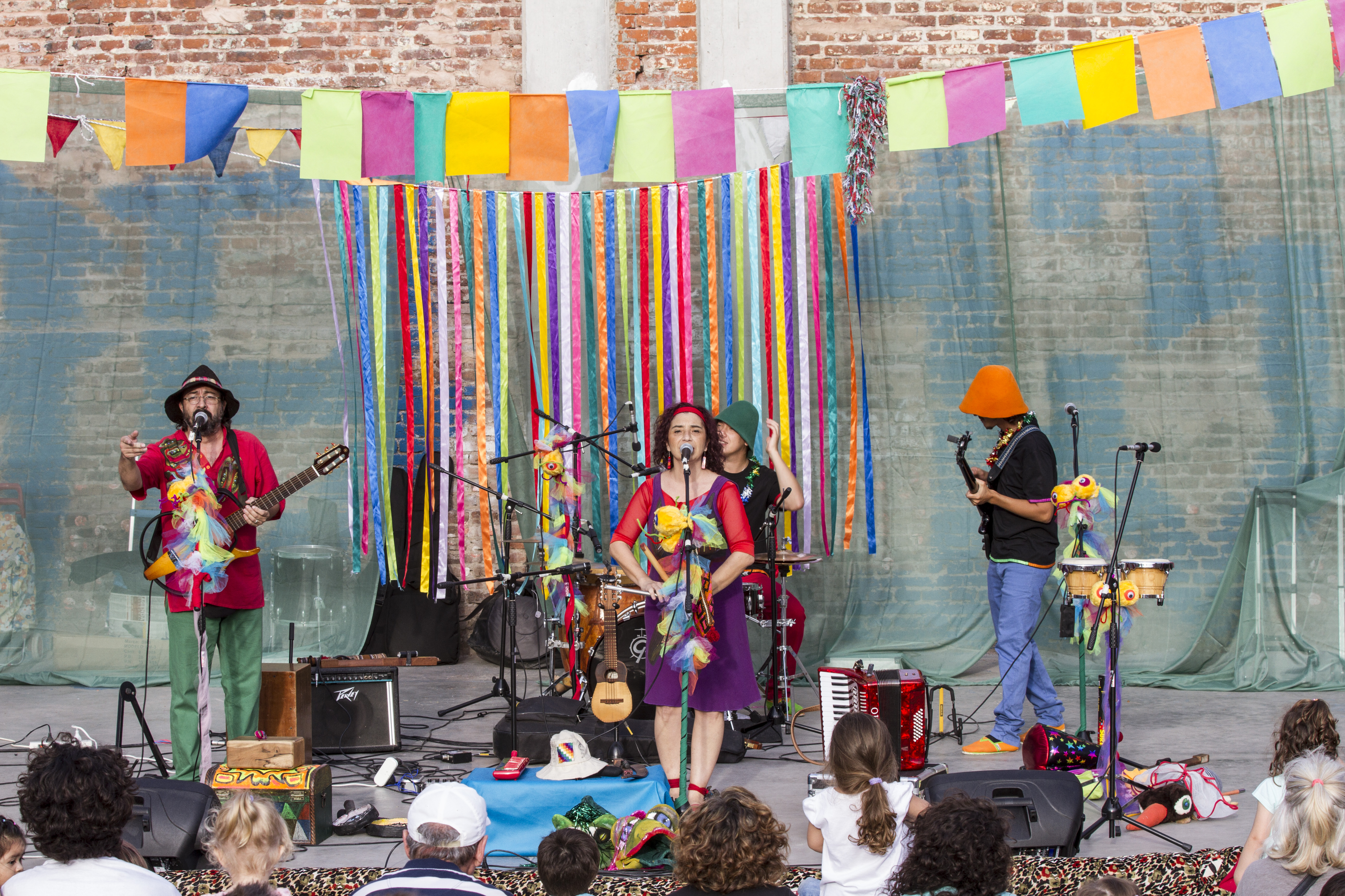 Buenos Aires, 3 de marzo de 2019 - Presentación de los grupos Cielo Arriba, Pitipá y Pichiculundios en el Festical Momusi, de FestejAR. Fotos: Romina Santarelli / Secretaría de Cultura de la Nación.